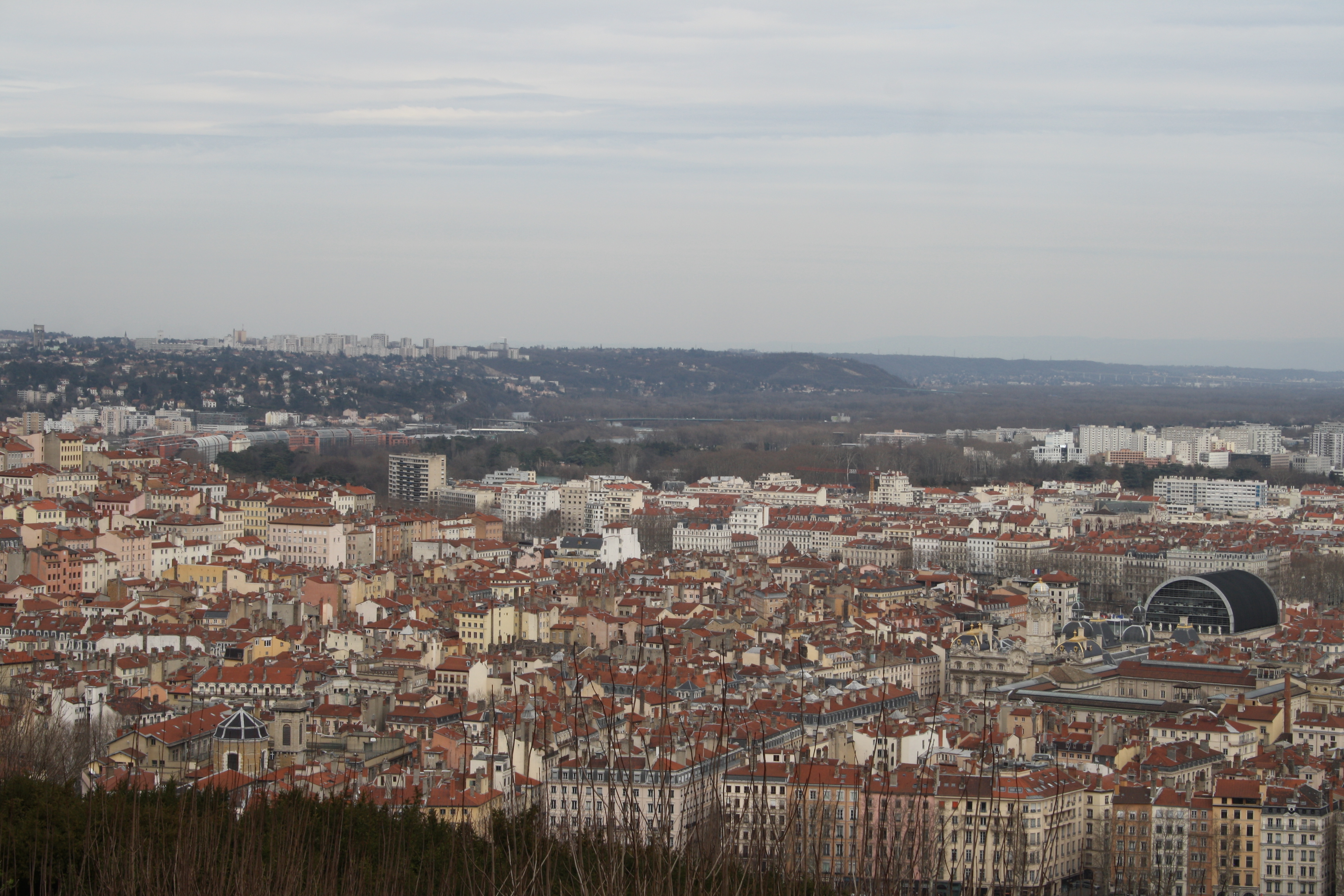 Vue du 1er arrondissement de Lyon (des Terreaux aux pentes de la Croix-Rousse) depuis Fourvière